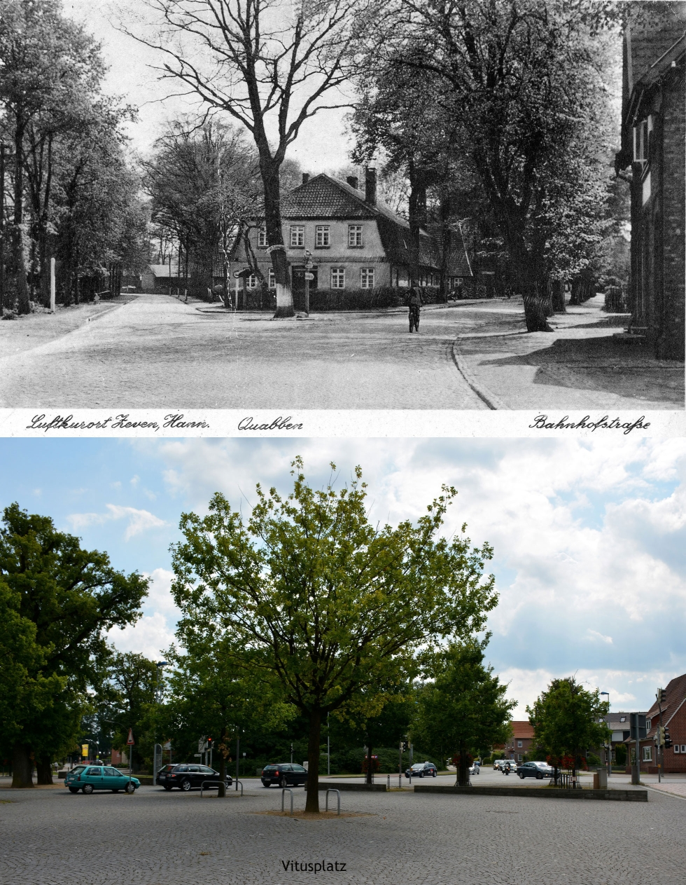 Auf dem Quabben-Bahnhofstraße-Vitusplatz in Zeven